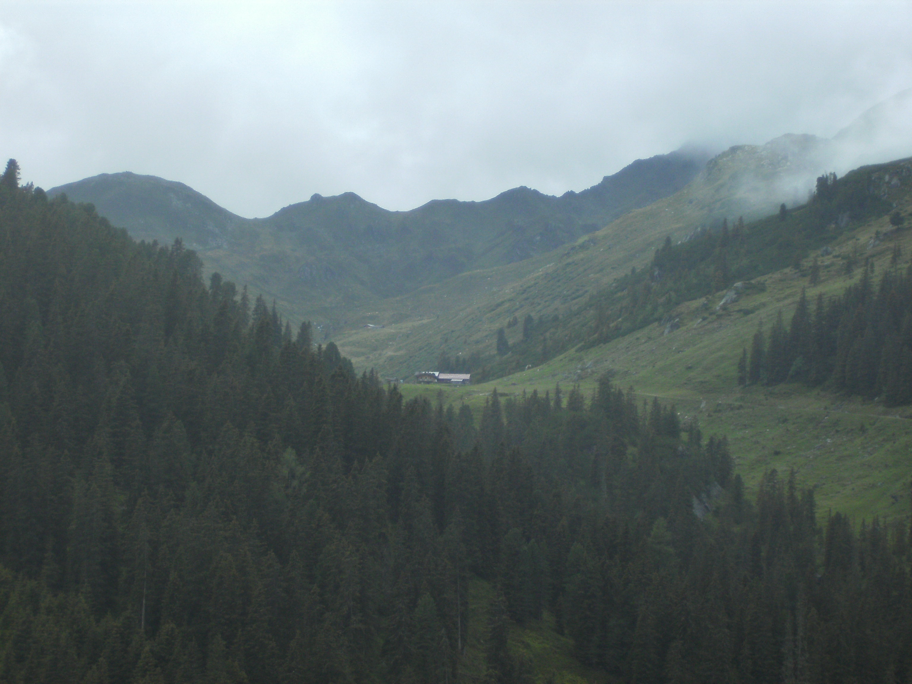 Trattenbachalm von Sonntagalm